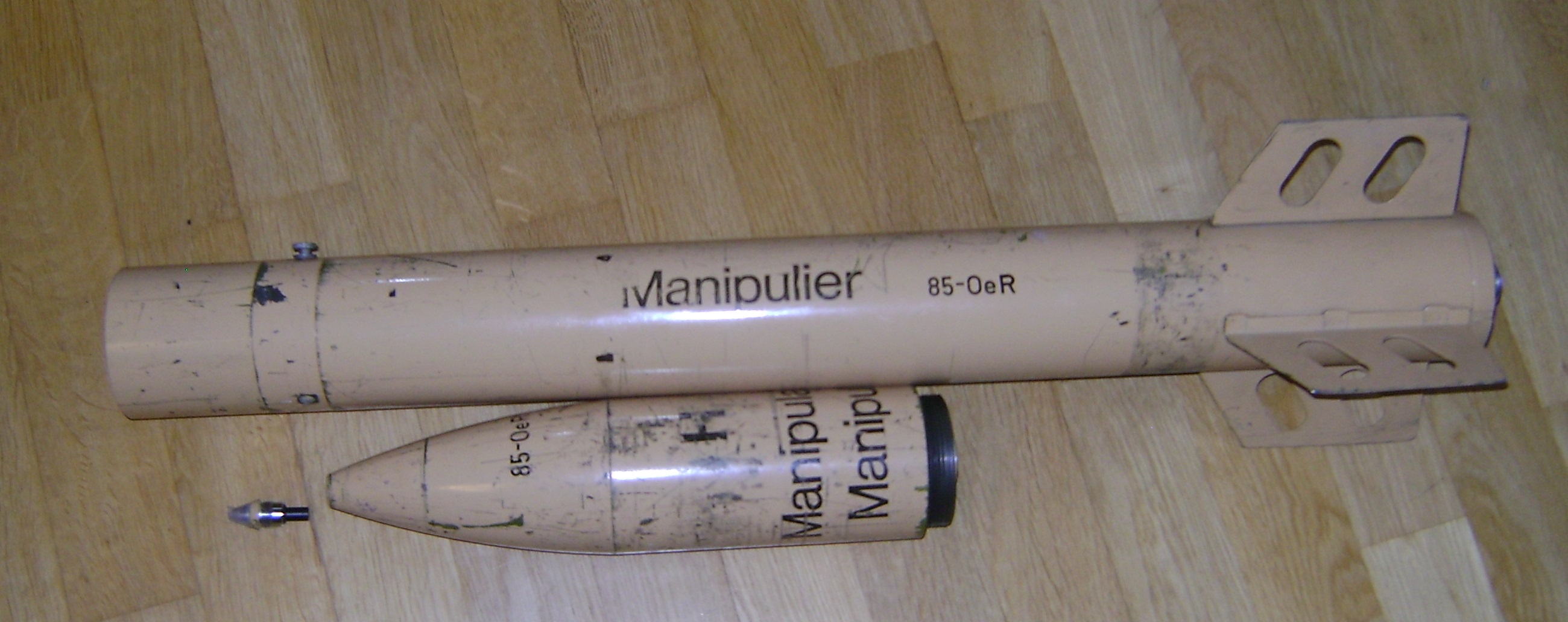 Oerlikon86 zerlegt